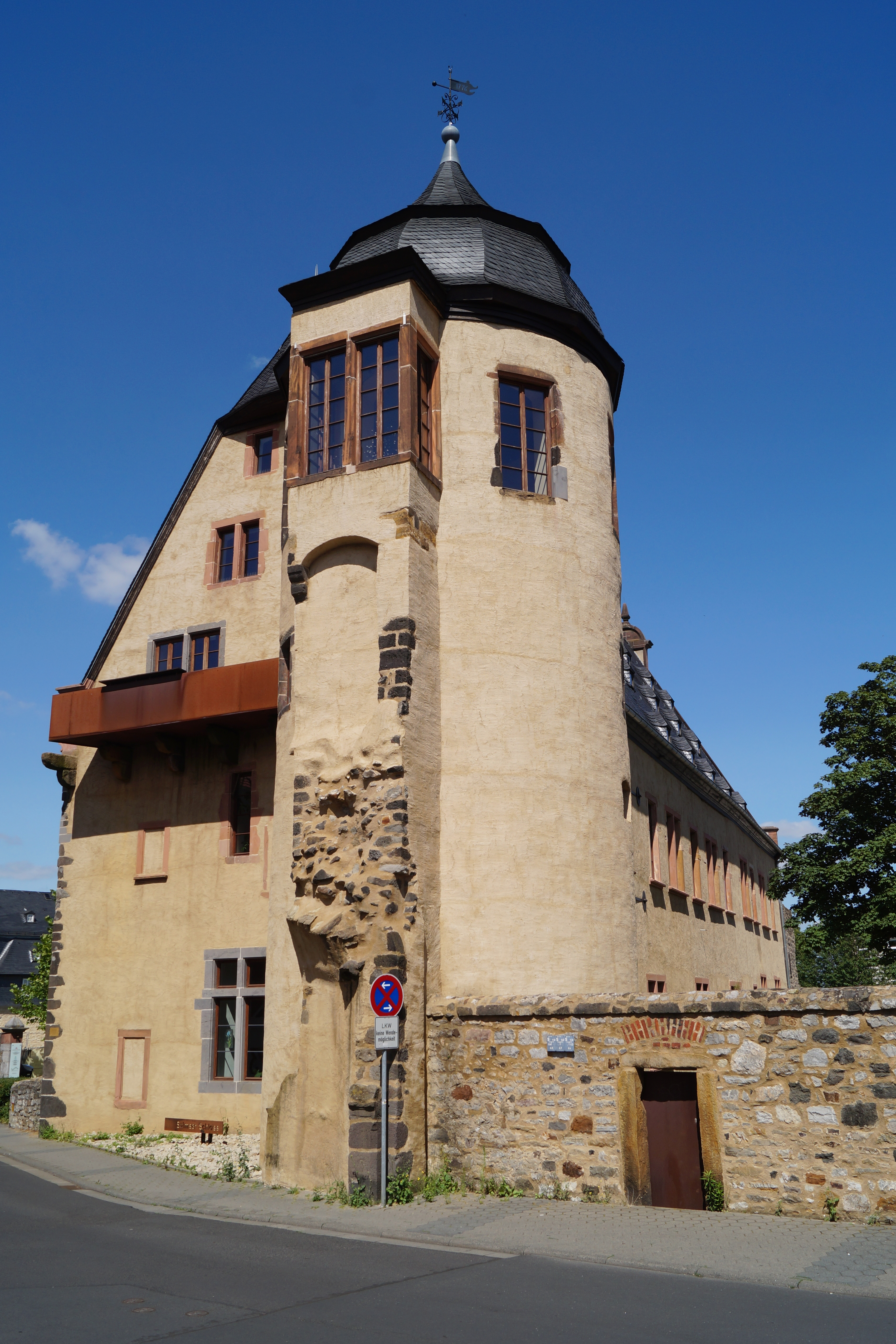 Ehemaliges Solmser Schloss in Butzbach, Hessen. Ansicht von Südwesten (Stadtseite mit anschließender Stadtmauer).